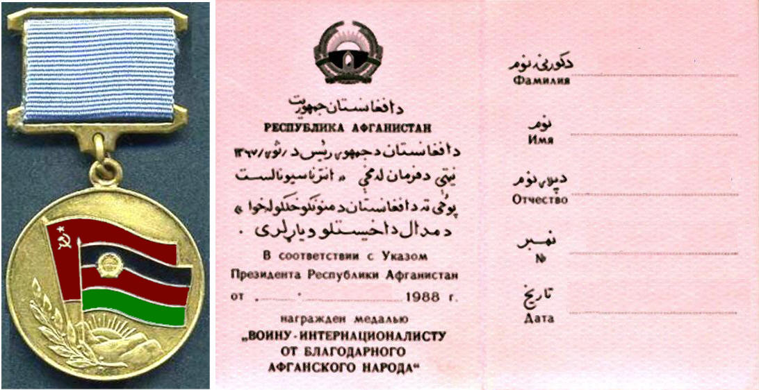 медаль и удостоверение к медали